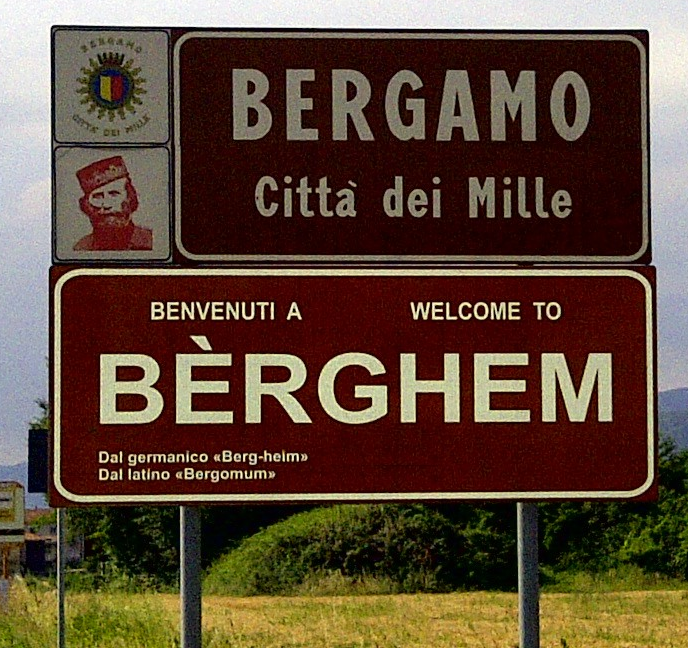 Cartello stradale posto a ogni ingresso della città di Bergamo, anche in dialetto bergamasco.